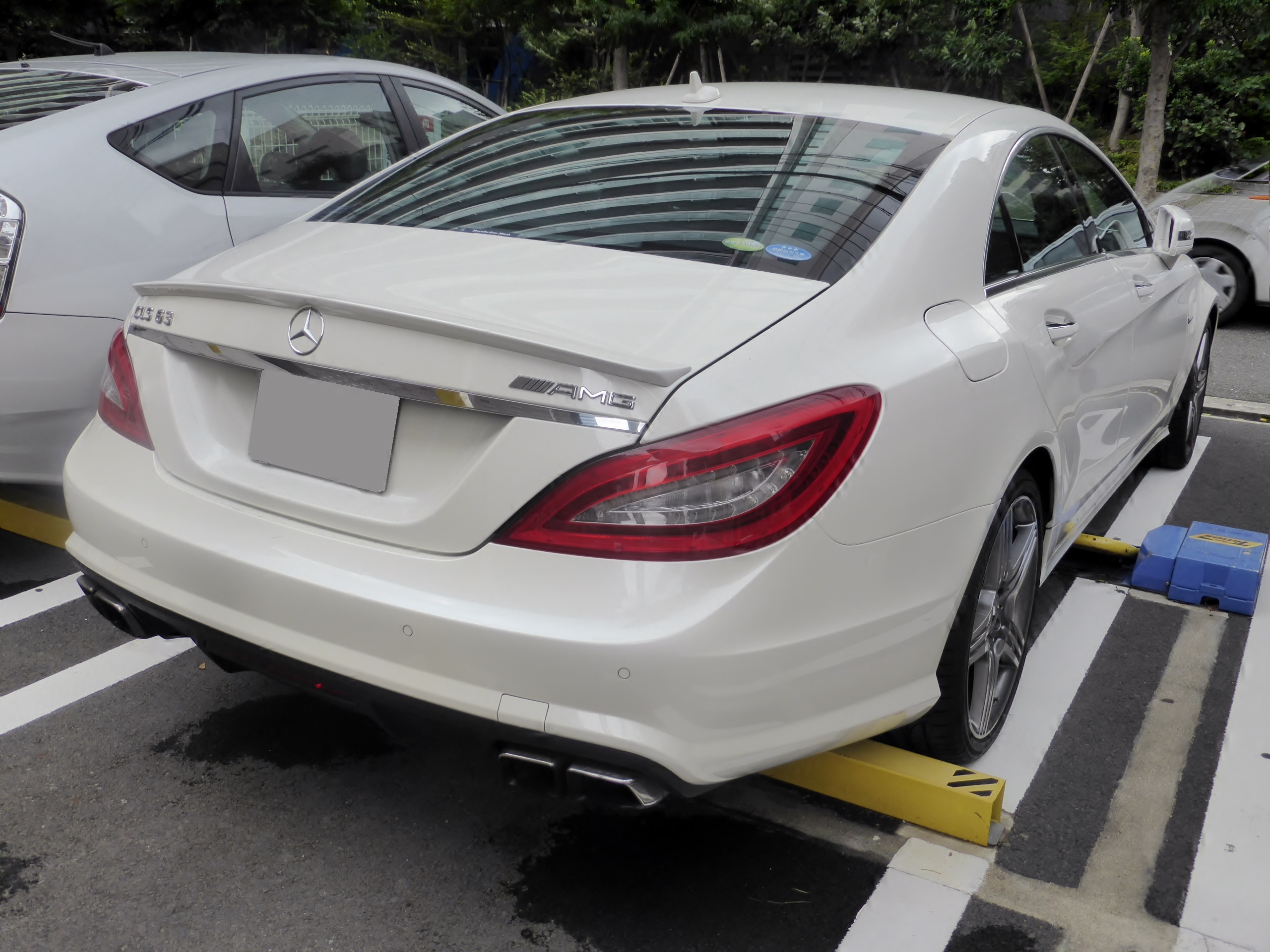 C218型メルセデス・ベンツCLS63 AMGをリアから撮影。